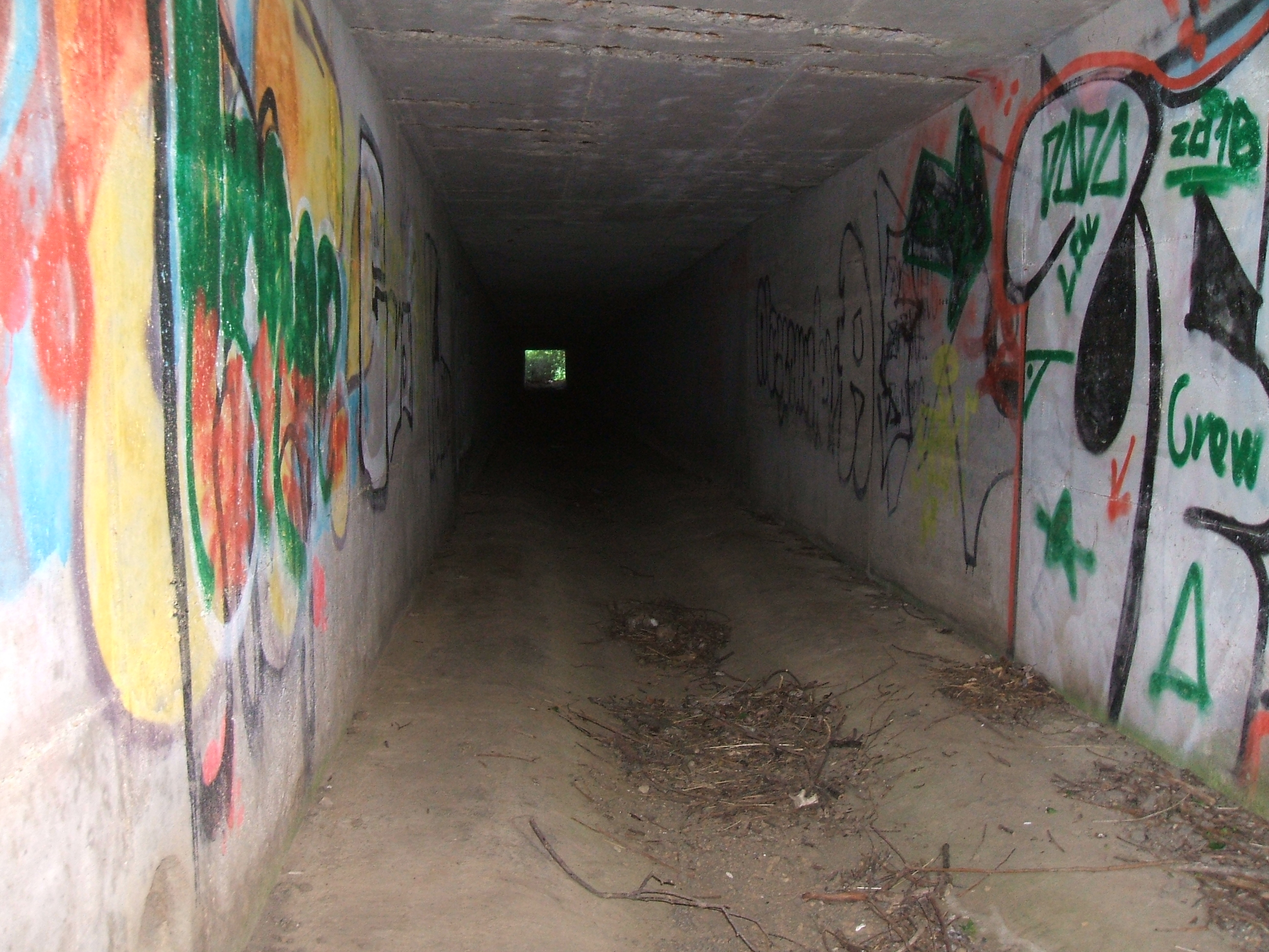 Der Durchlass des Säckelgrabens unter der A 5 hat einen ungewöhnlichen quadratischen Querschnitt